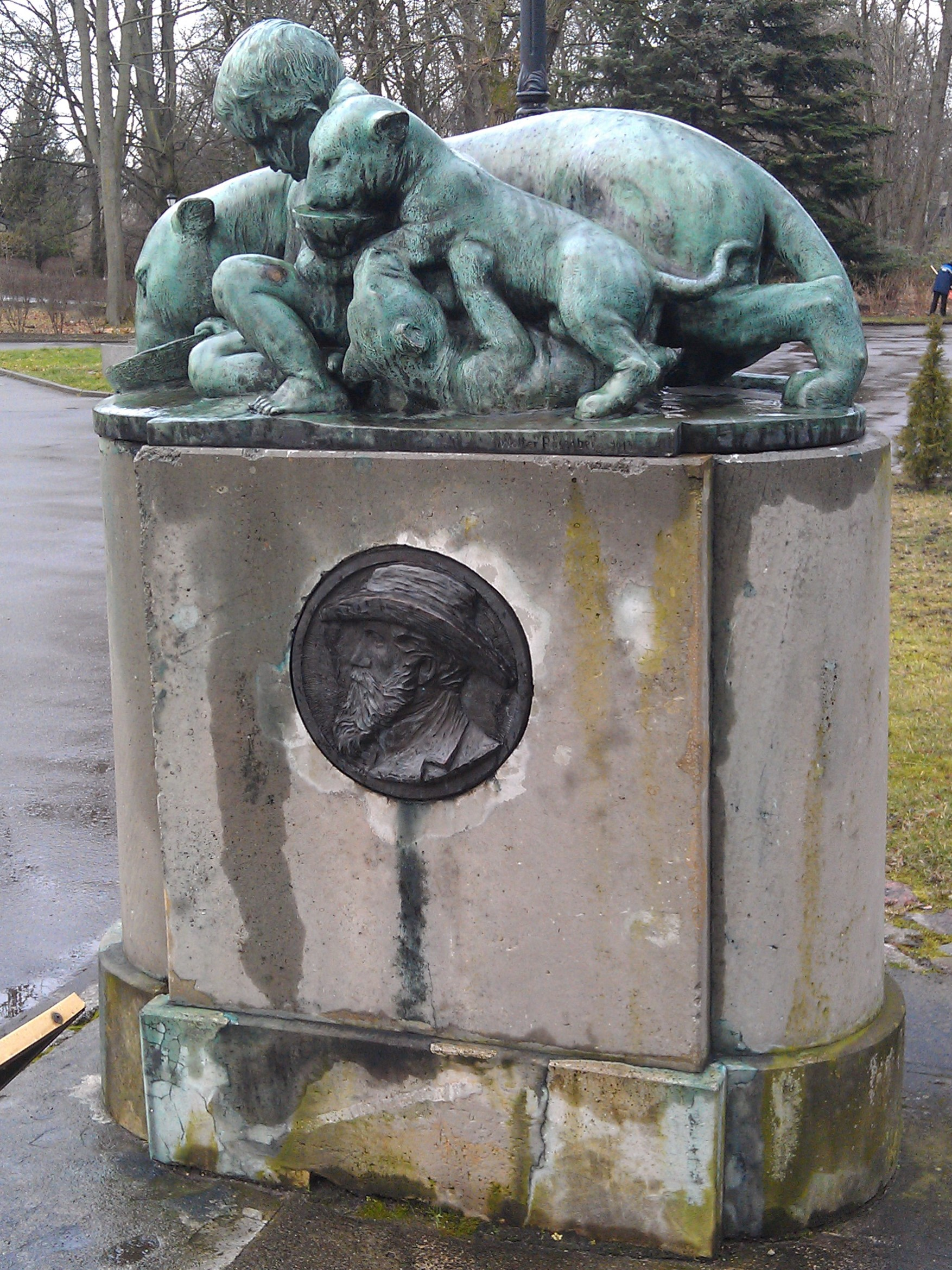 Памятник Герману Клаассу в Калининградском зоопарке скульптора Вальтера Розенберга. 1913.